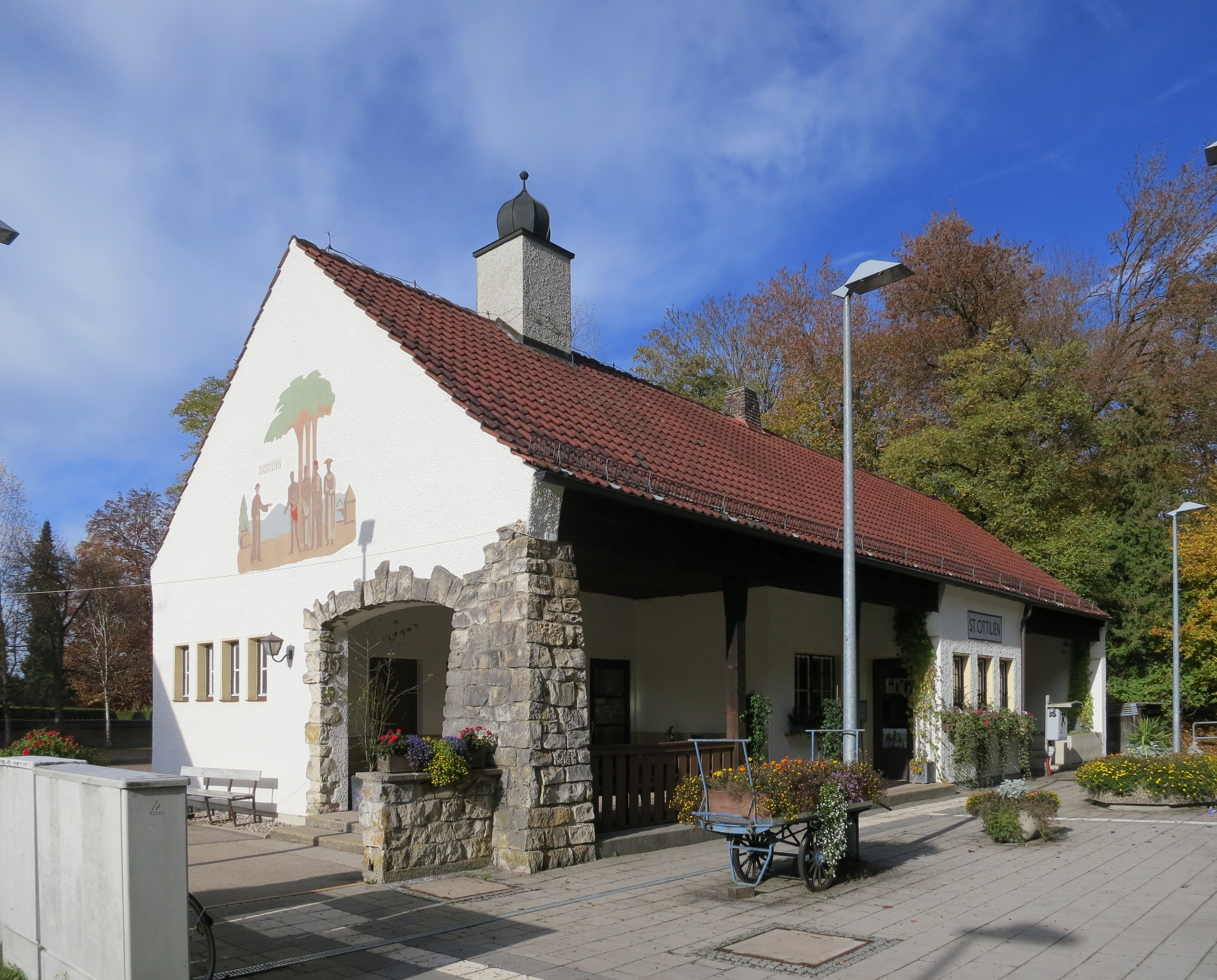 Empfangsgebäude des Bahnhofs St. Ottilien von der Gleisseite